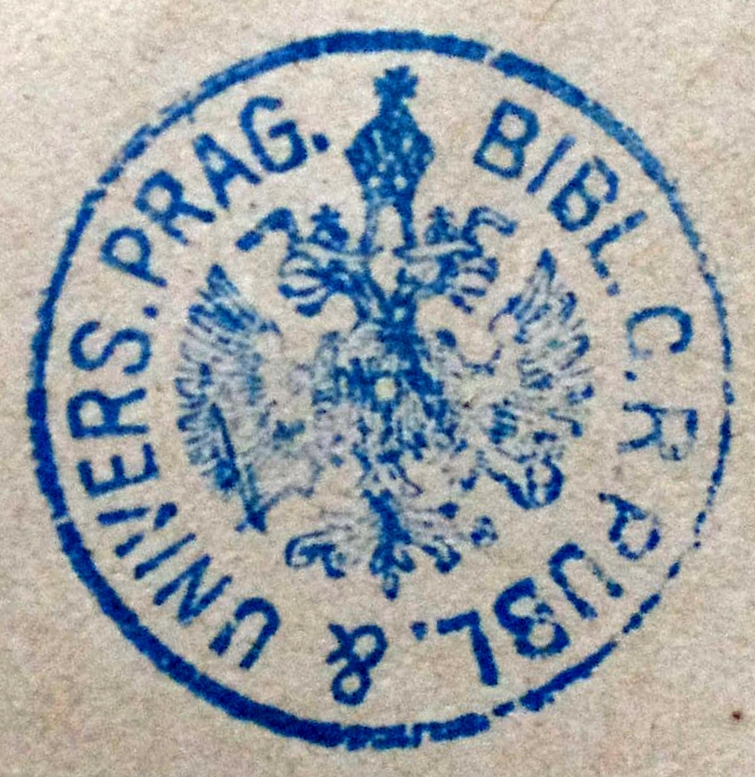 razitko univerzity